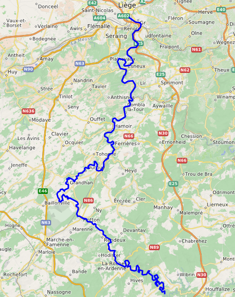 carte réalisée sur umap This map may be incomplete, and may contain errors. Don't rely solely on it for navigation.